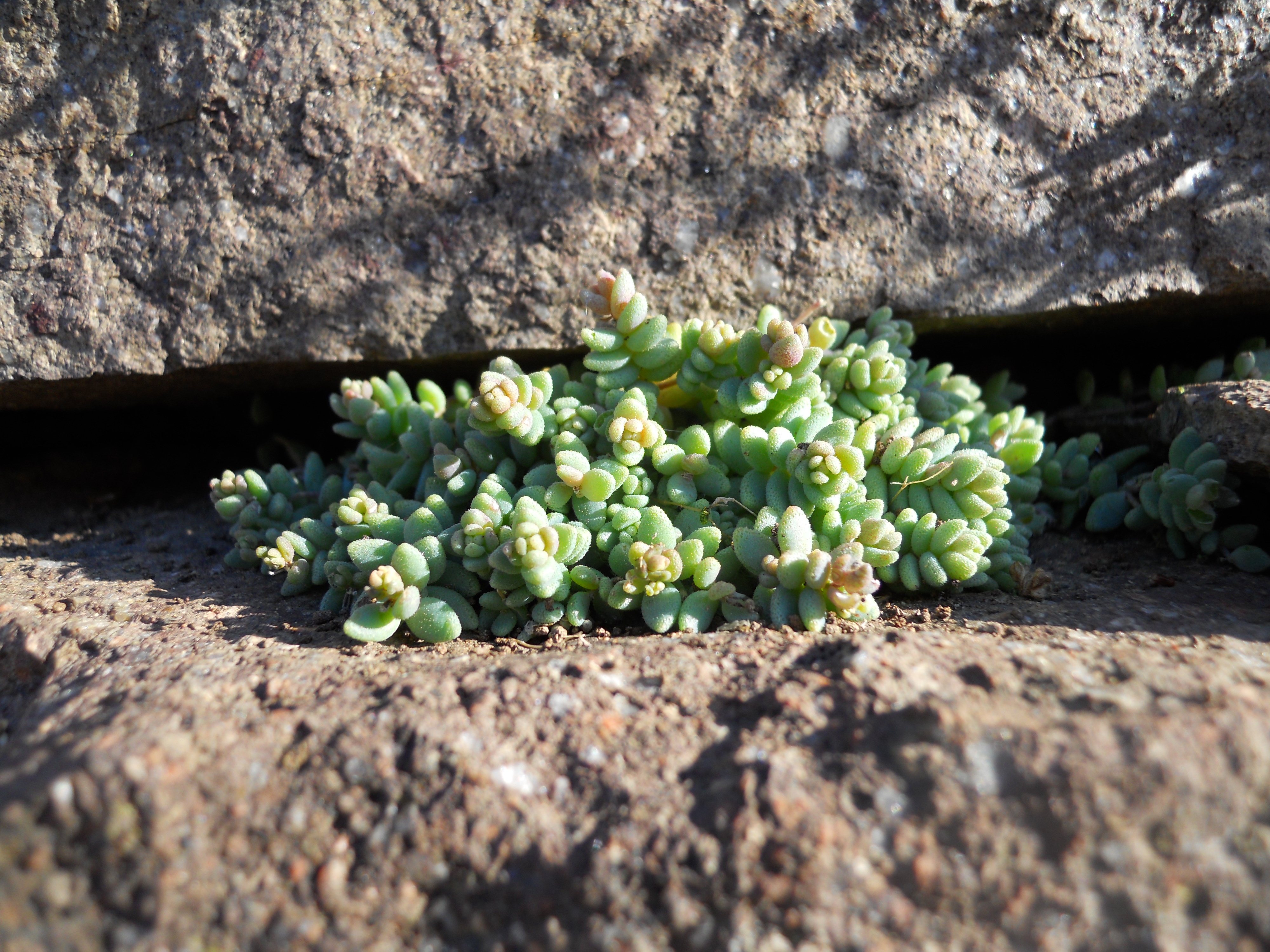 Erba del genere Sedum dasyphyllum